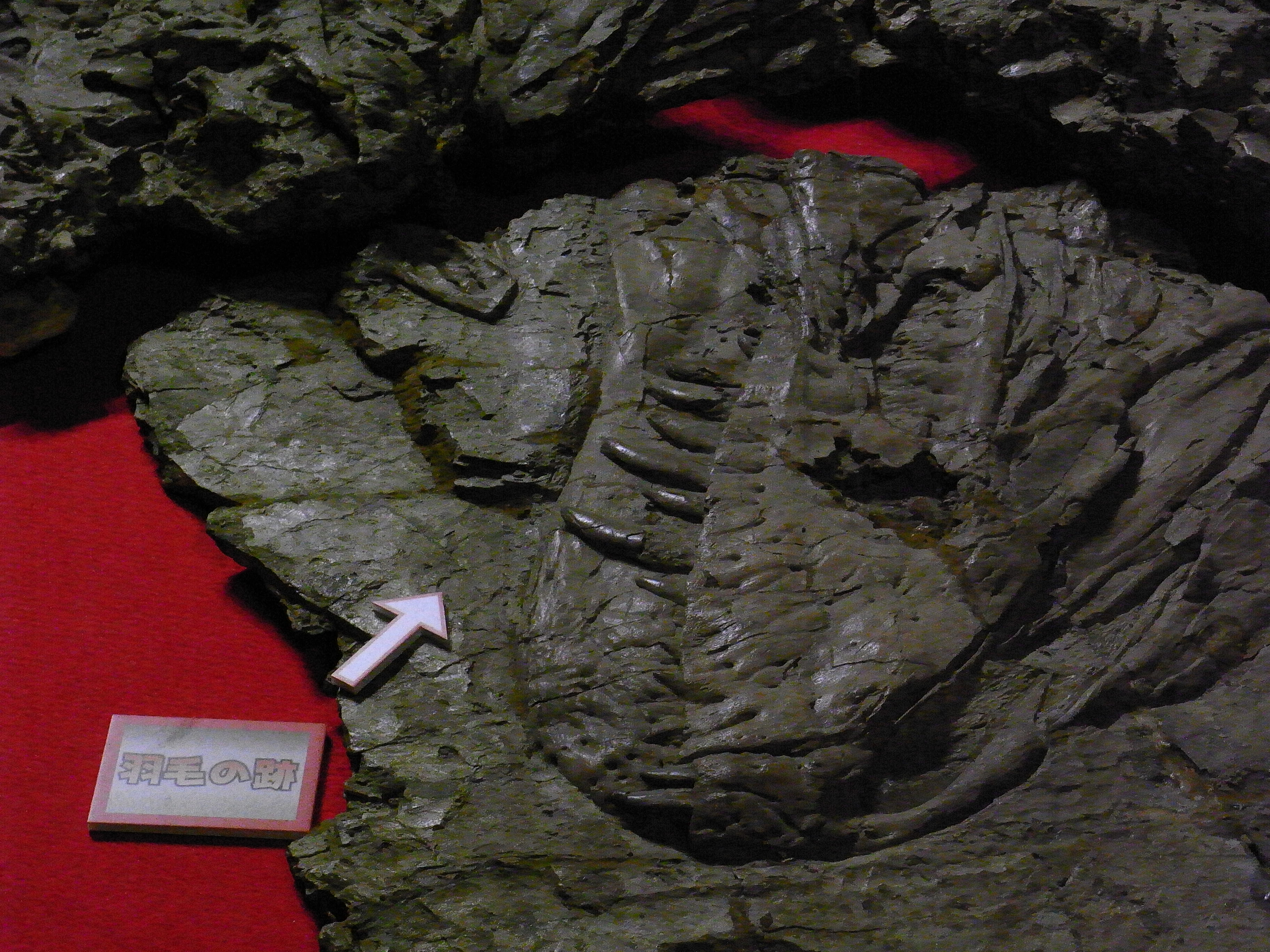 ここですね。御親切にどうも。